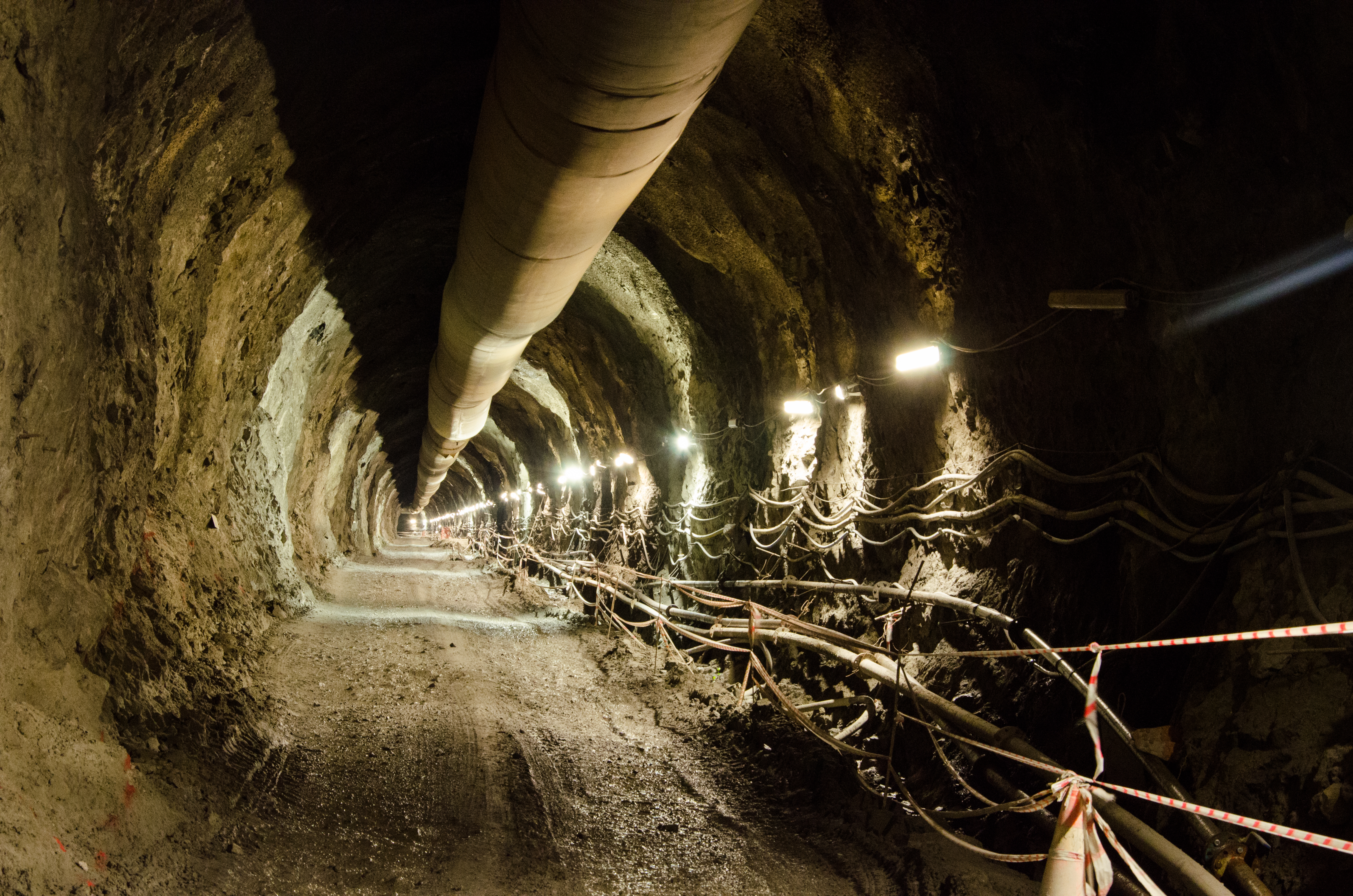 შუახევიჰესის გვირაბის სიგრძე 37.5 კმ-ია, ფოტო გადაღებულია აჭარაში, დაბა შუახევში.